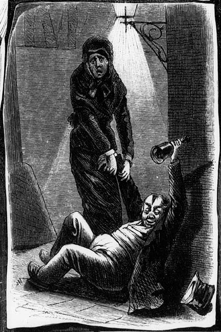 Ilustración de un alcohólicoGustav Imlauer:Ihr zu Füßen!